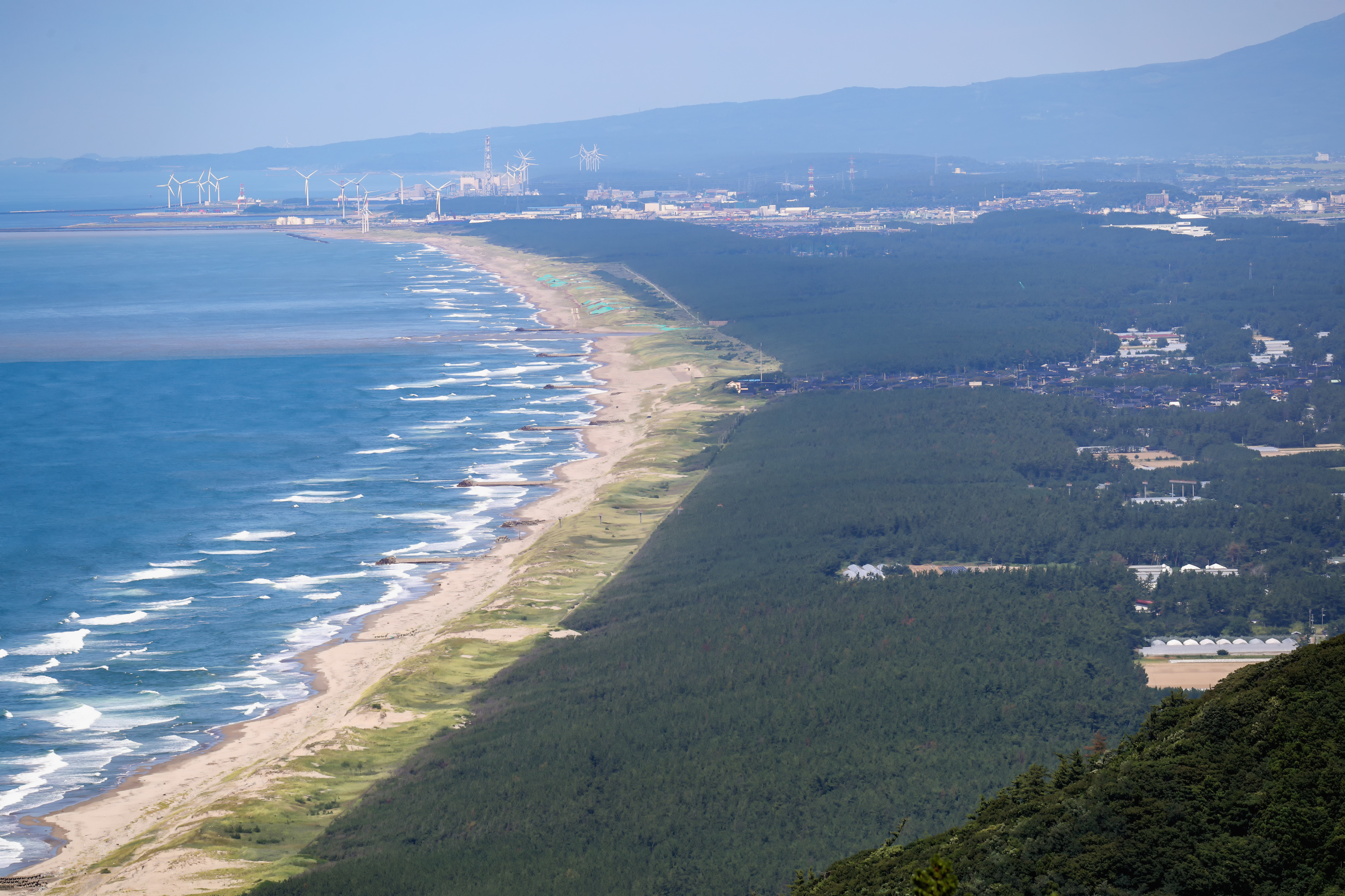 庄内砂丘 山形県北西部の日本海岸にある砂丘で、鶴岡市湯野浜から酒田市を経て飽海郡遊佐町吹浦(ふくらまで約35kmに及び、日本一長い砂丘である。 最大幅は約3kmで北へ行くにつれて狭くなっていく。面積は55.44平方kmの日本有数の砂丘で、2～3列の砂丘列からなり、東（内陸）側のものが最も大きい。最高点は 100m余で、砂丘としては日本有数の高さである。 黒色砂層を挟み、下部の古砂丘と上部の新砂丘が重合した構造をもつ。 砂防林としてクロマツなどの植林が行われ、砂丘列間の低地は地下水灌漑による耕地化も進み、現在はメロンやスイカ、チューリップ等が栽培される。